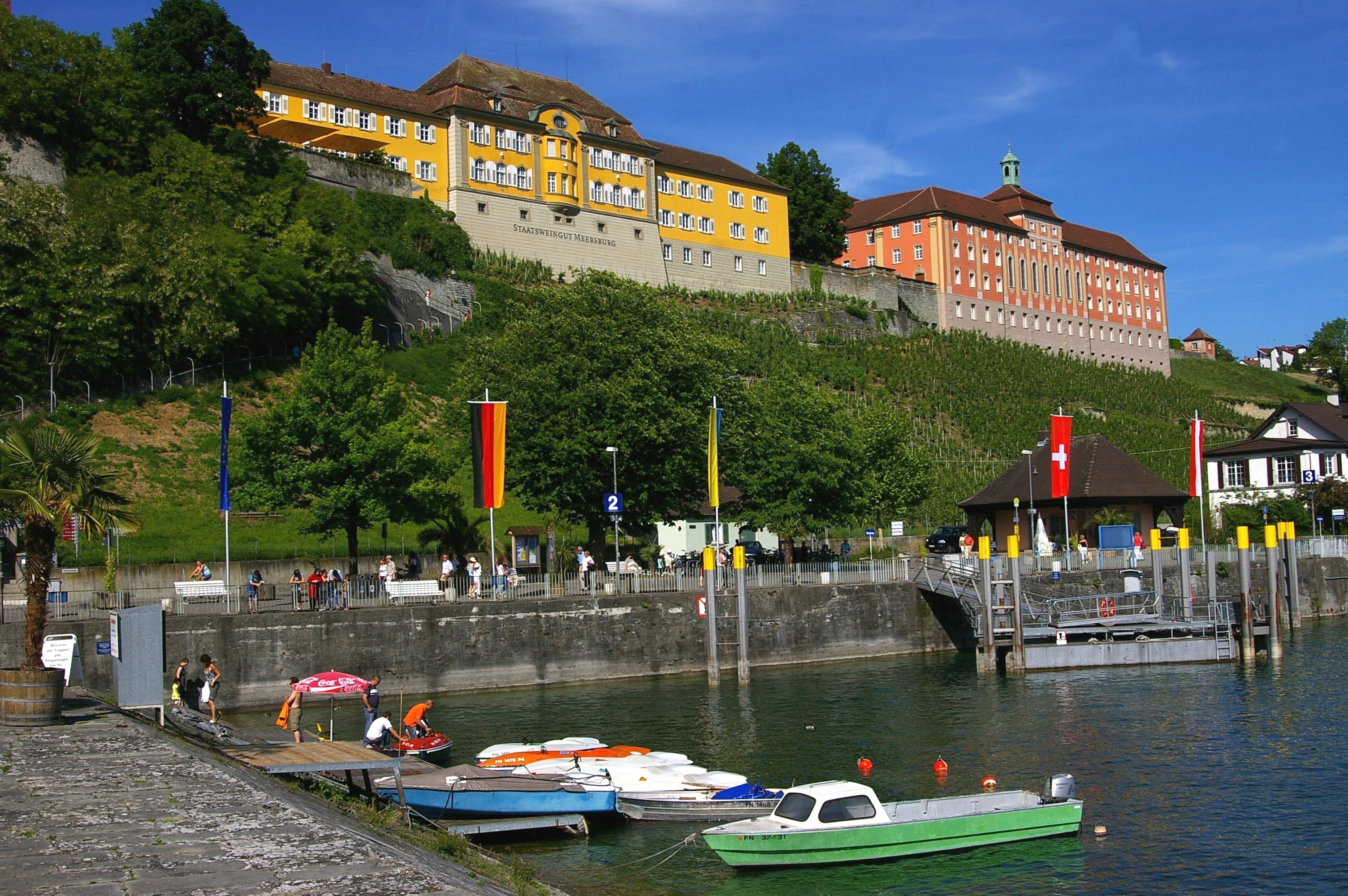 Meersburg - Staatsweingut und Droste-Hülshoff-Gymnasium